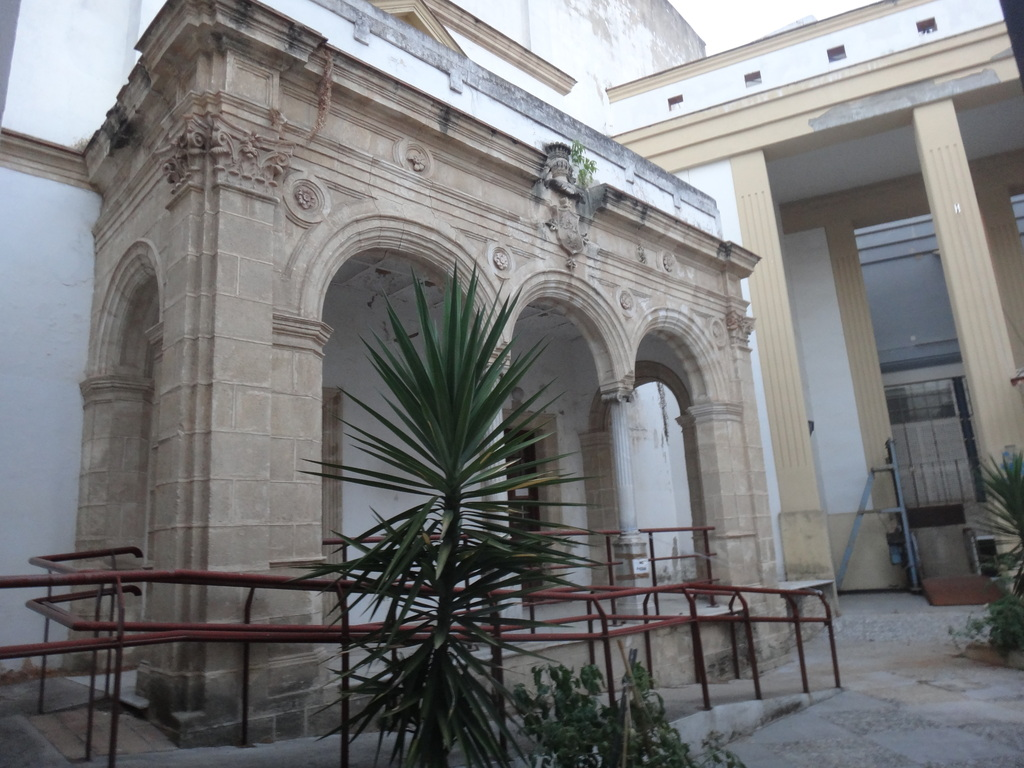 Trasera de la actual sede de la UNED en Jerez de la Frontera, próxima sede del Ateneo (Andalucía, España).